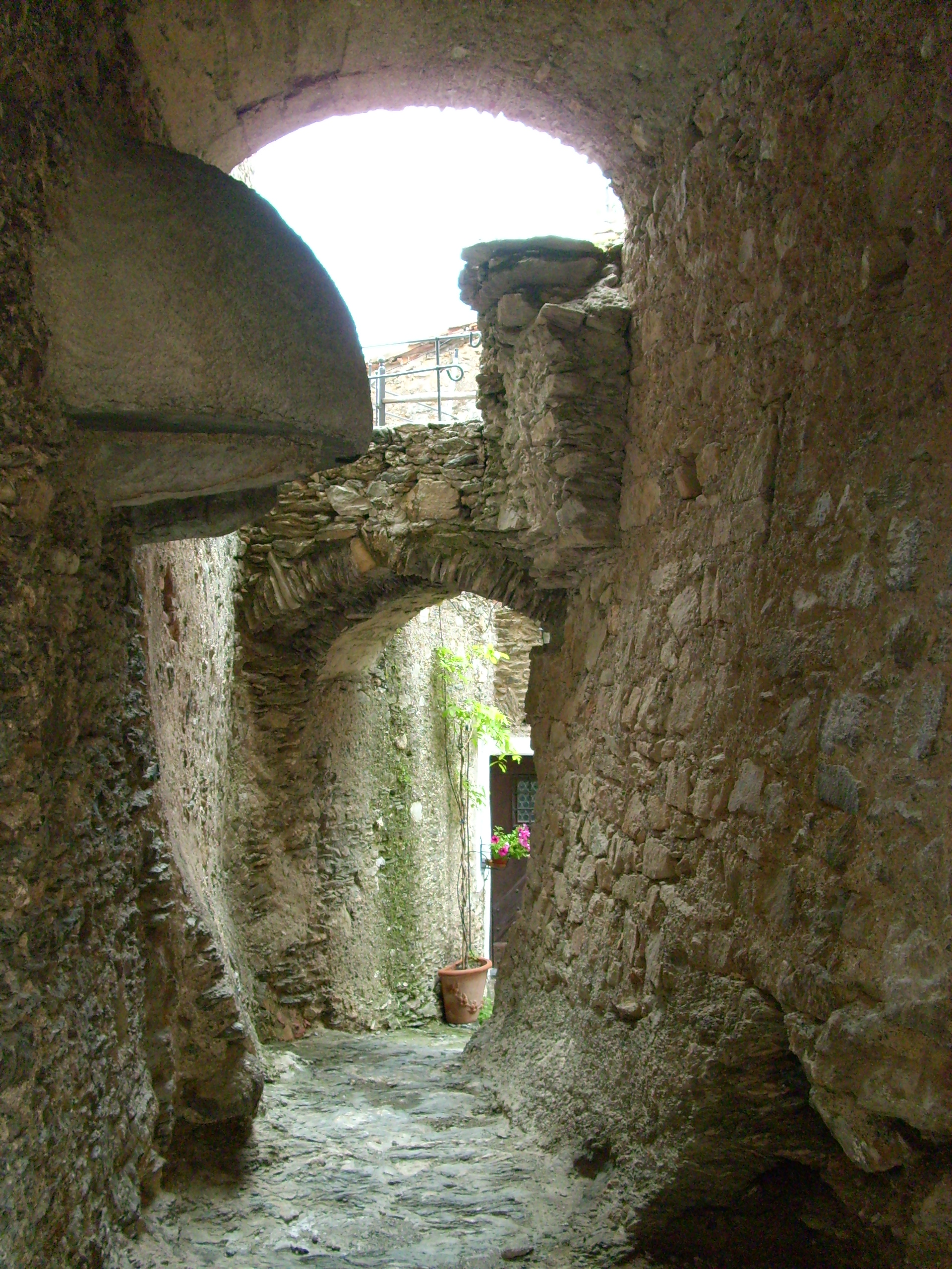 Castelvecchio di Rocca Barbena, Liguria, Italia